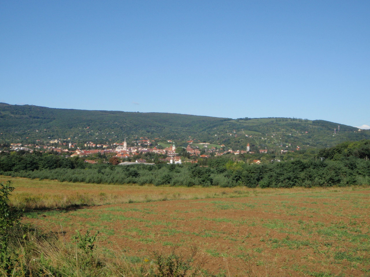 Günsecktal und Günser Gebirge, mit Güns